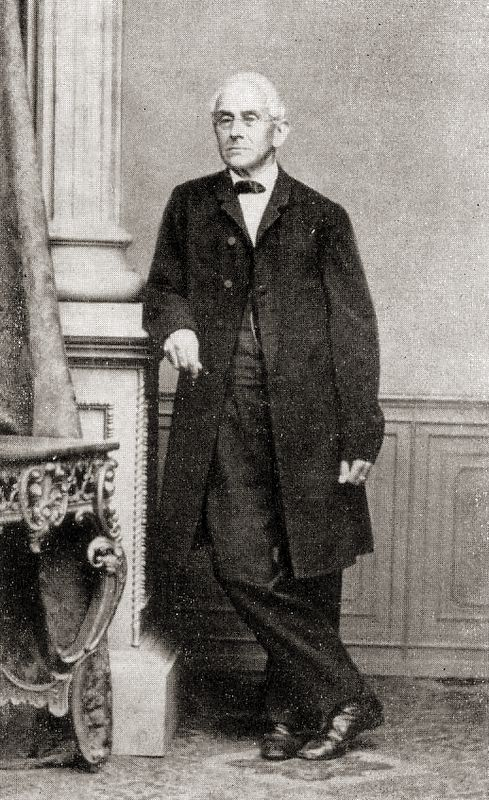 Summary Bildbeschreibung: Christian August Eduard Pötzsch Datum: Oktober 1866